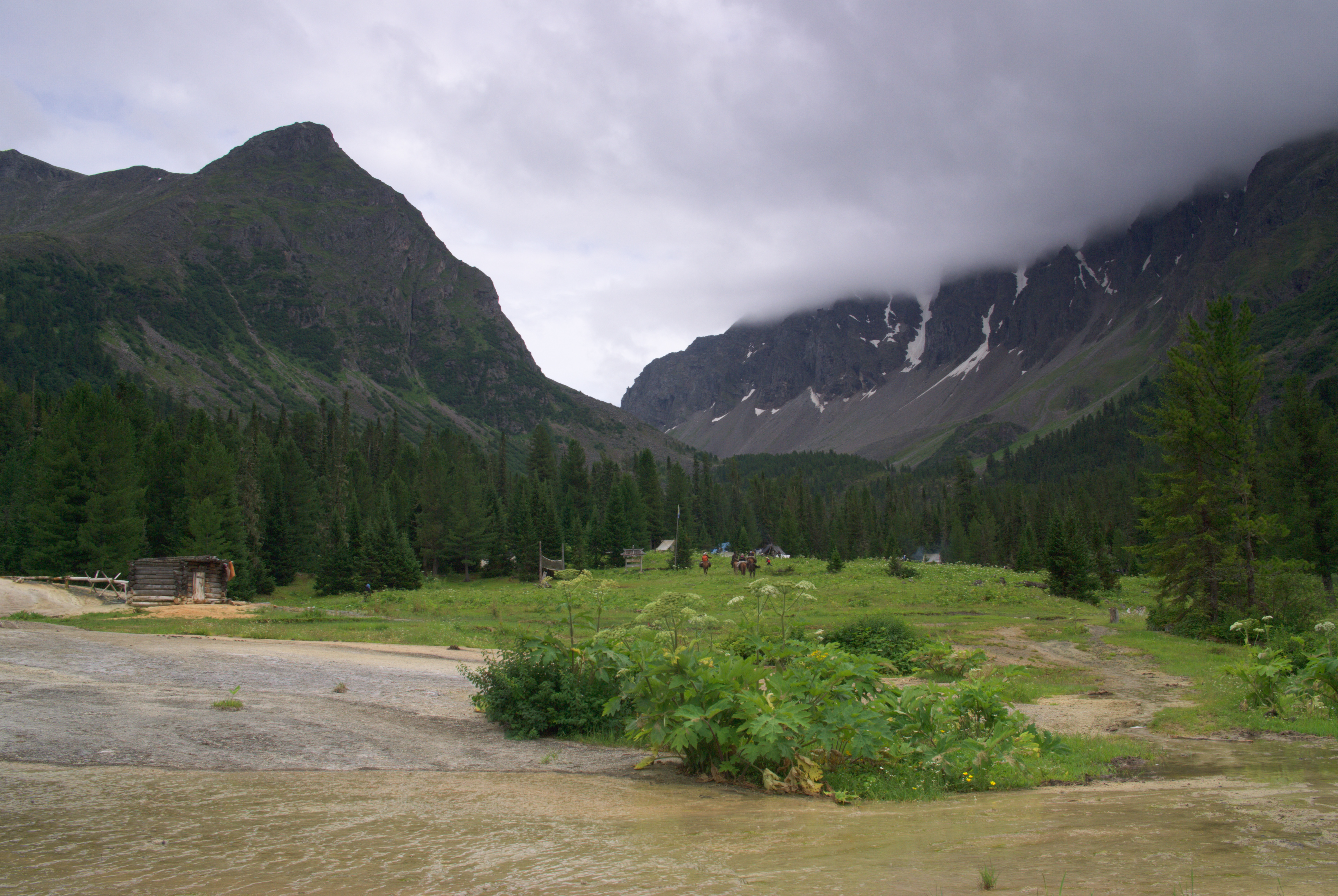 Аржаан Чойган: Тоджинский кожуун, Тува This image is related to the protected area of Russia number 1710046